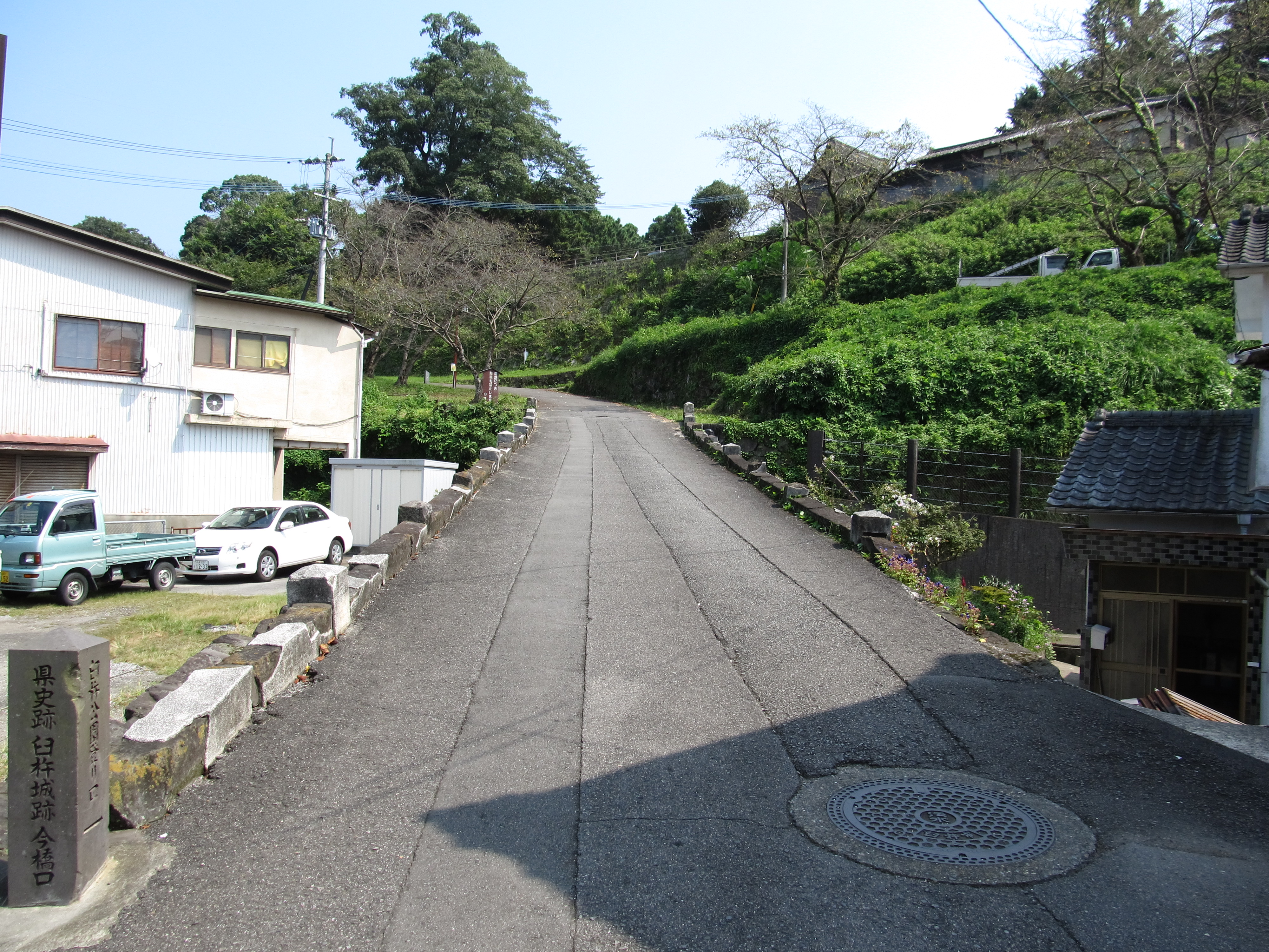 大分県臼杵市にある臼杵城跡（臼杵公園）の今橋口。